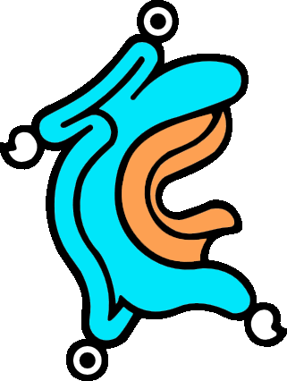 Atenco kommunes symbol, med samme farger som det forekommer med i Mendoza-kodeksen